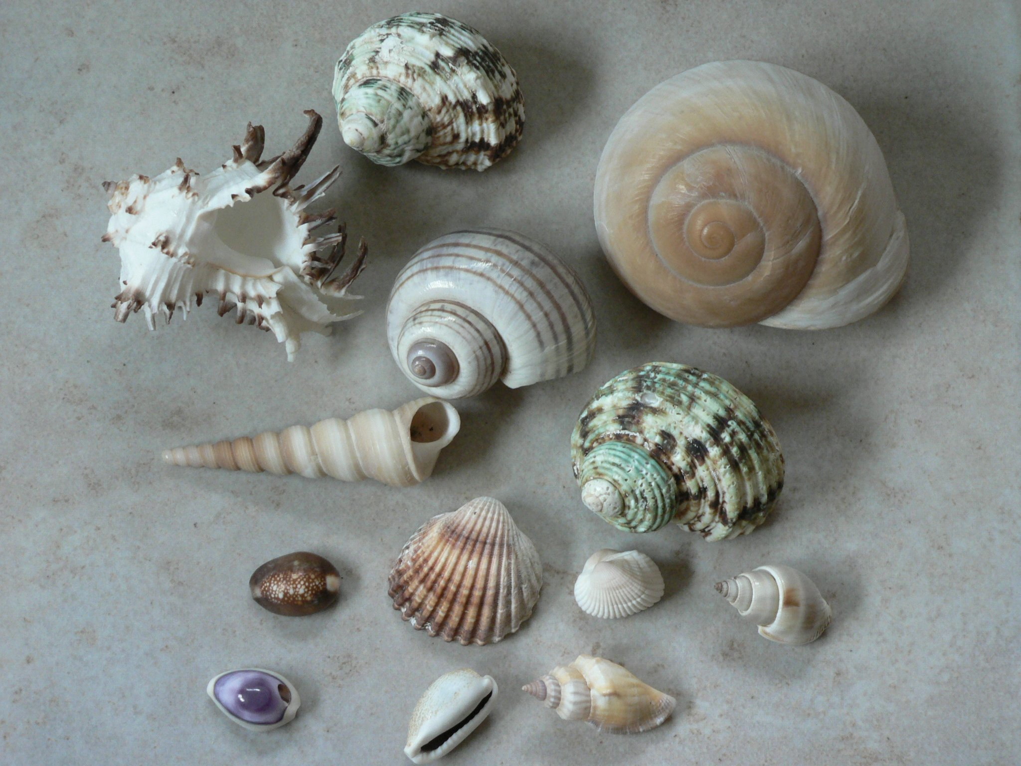 Shells קונכיות